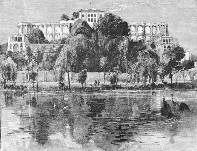 Iran